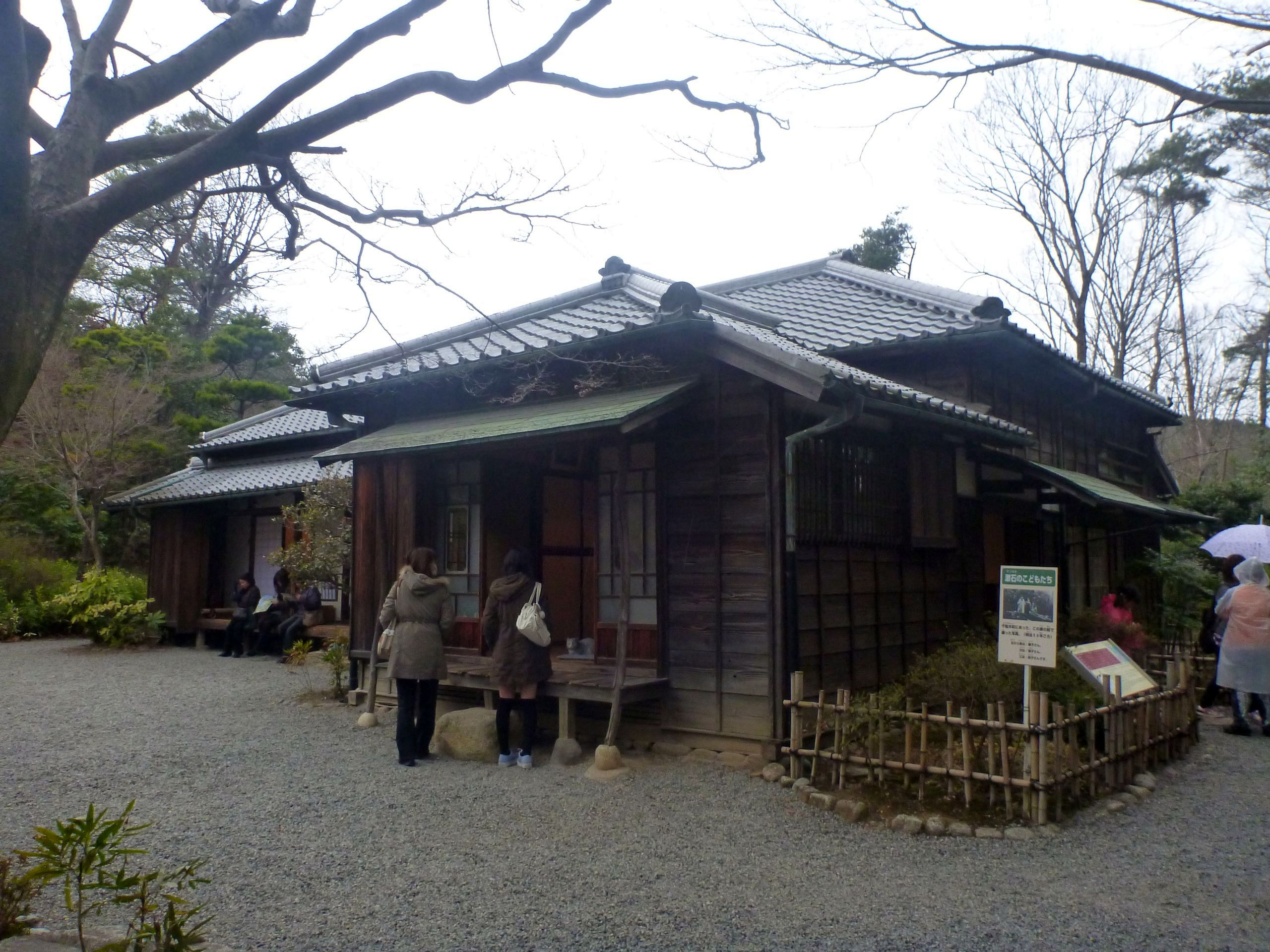 森鴎外・夏目漱石住宅